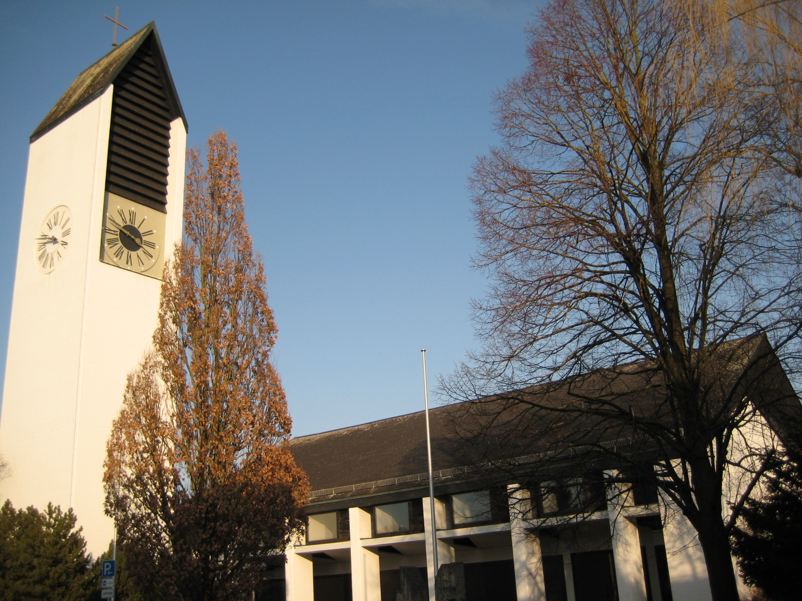 Kirche St. Ulrich in Pulling bei Freising